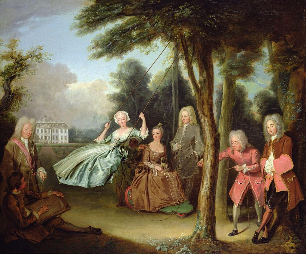 Cette peinture de Philippe Mercier (1689-1760) datant de 1725 montre Lord Tyrconnel (à gauche) et sa femme (assise, car invalide), ainsi que la cousine de Lady Tyrconnel et son mari, devant la façade Sud de Belton House, la demeure de campagne des Tyrconnel, dans le Lincolnshire. Le visage de l'artiste peut être aperçu en bas à gauche. C'est l'une des premières fêtes galantes en Anglettere, un style de peinture du XVIIIème siècle.